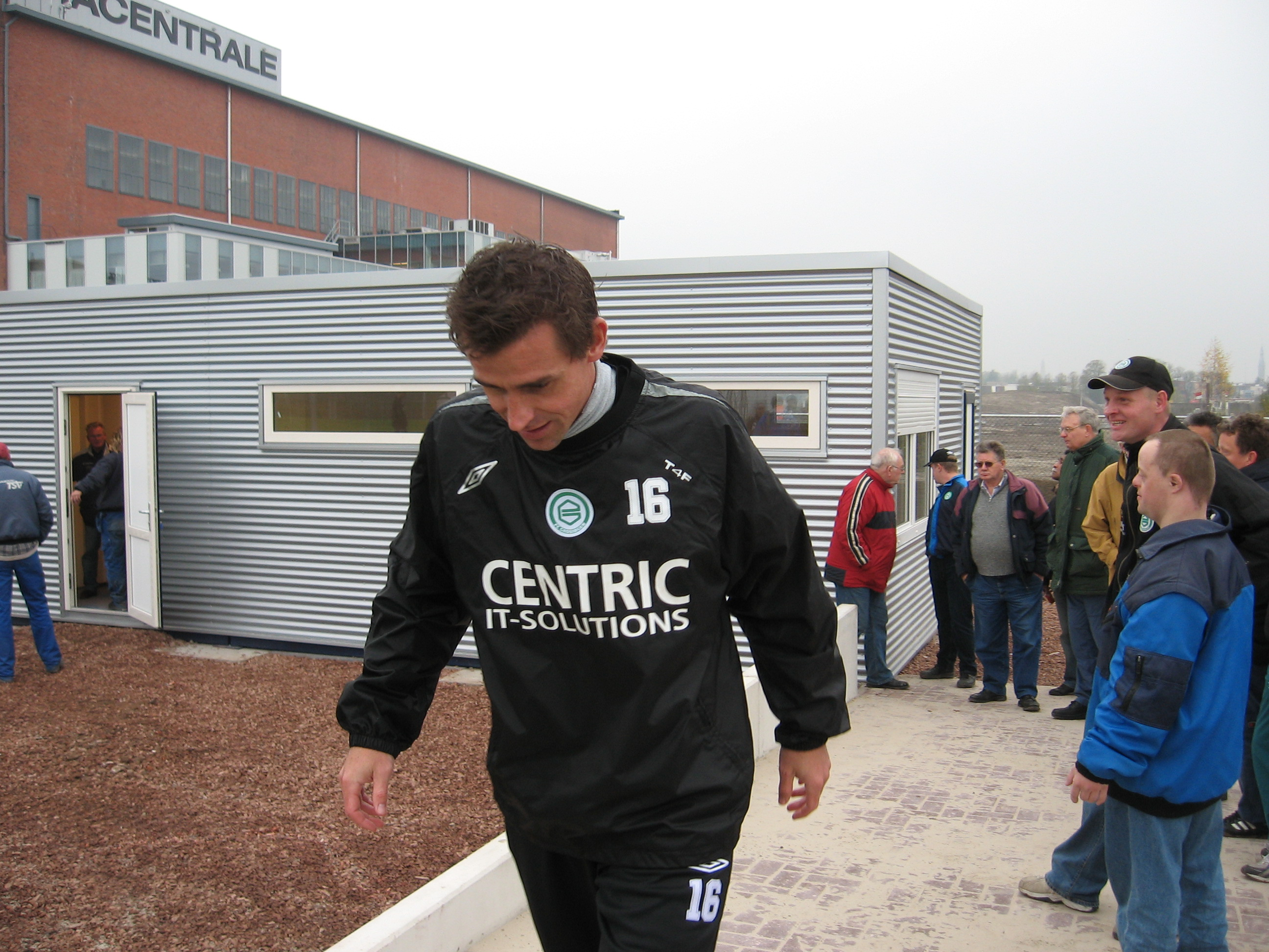 FC Groningen-speler Glen Salmon